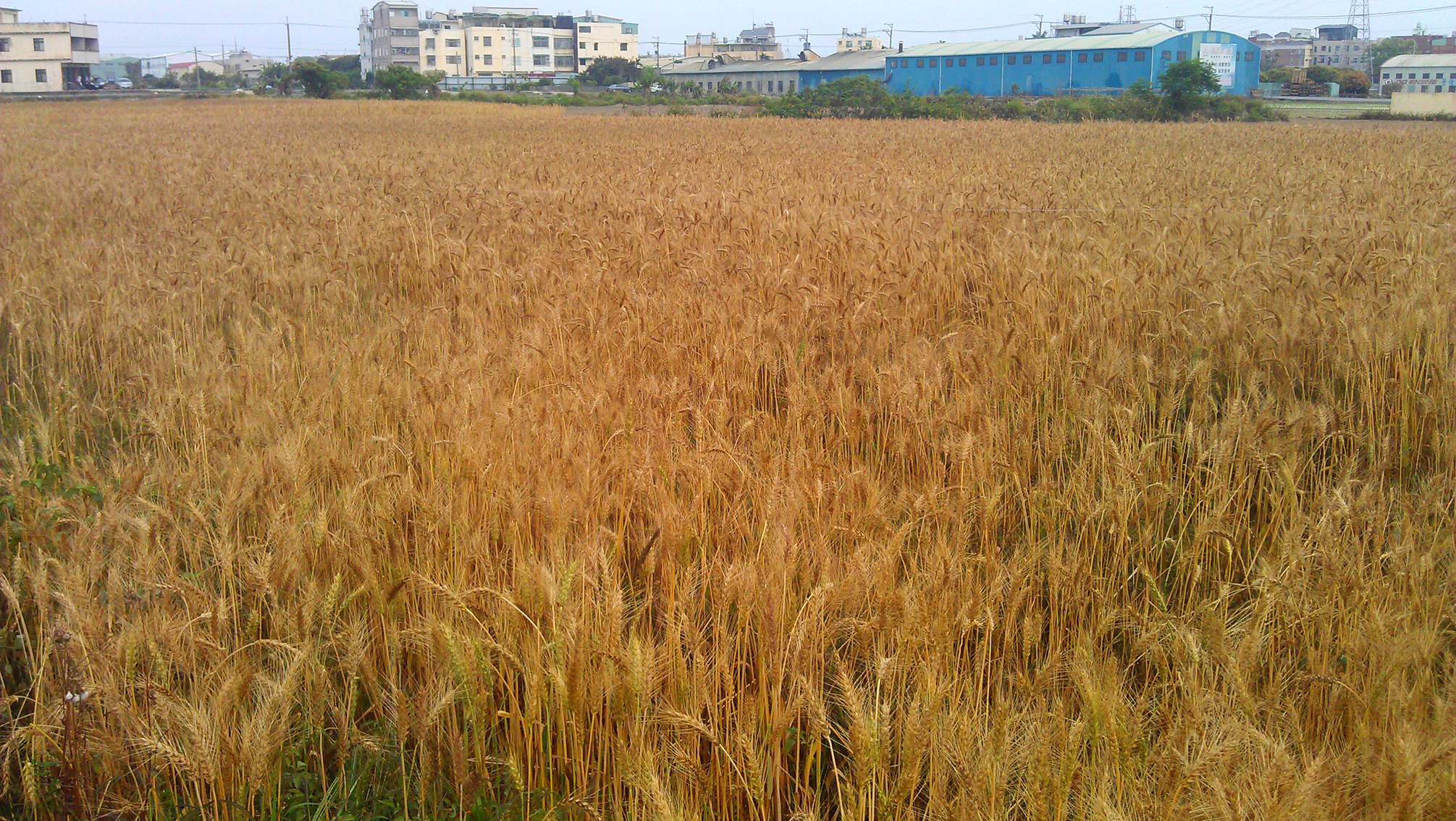 中文（台灣）: 臺中市大雅區小麥田。